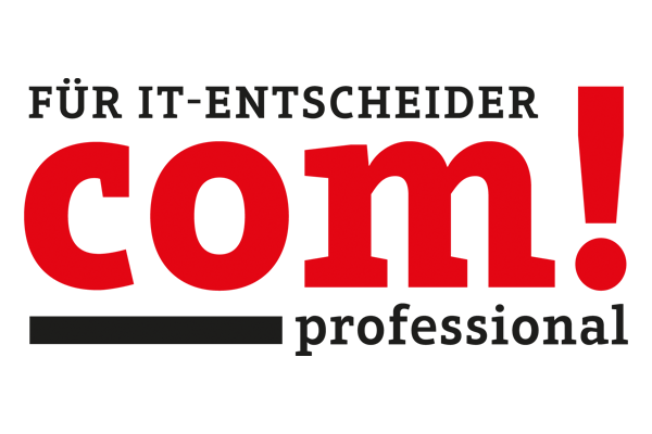 Logo von com! professional, einer IT Fachzeitschrift